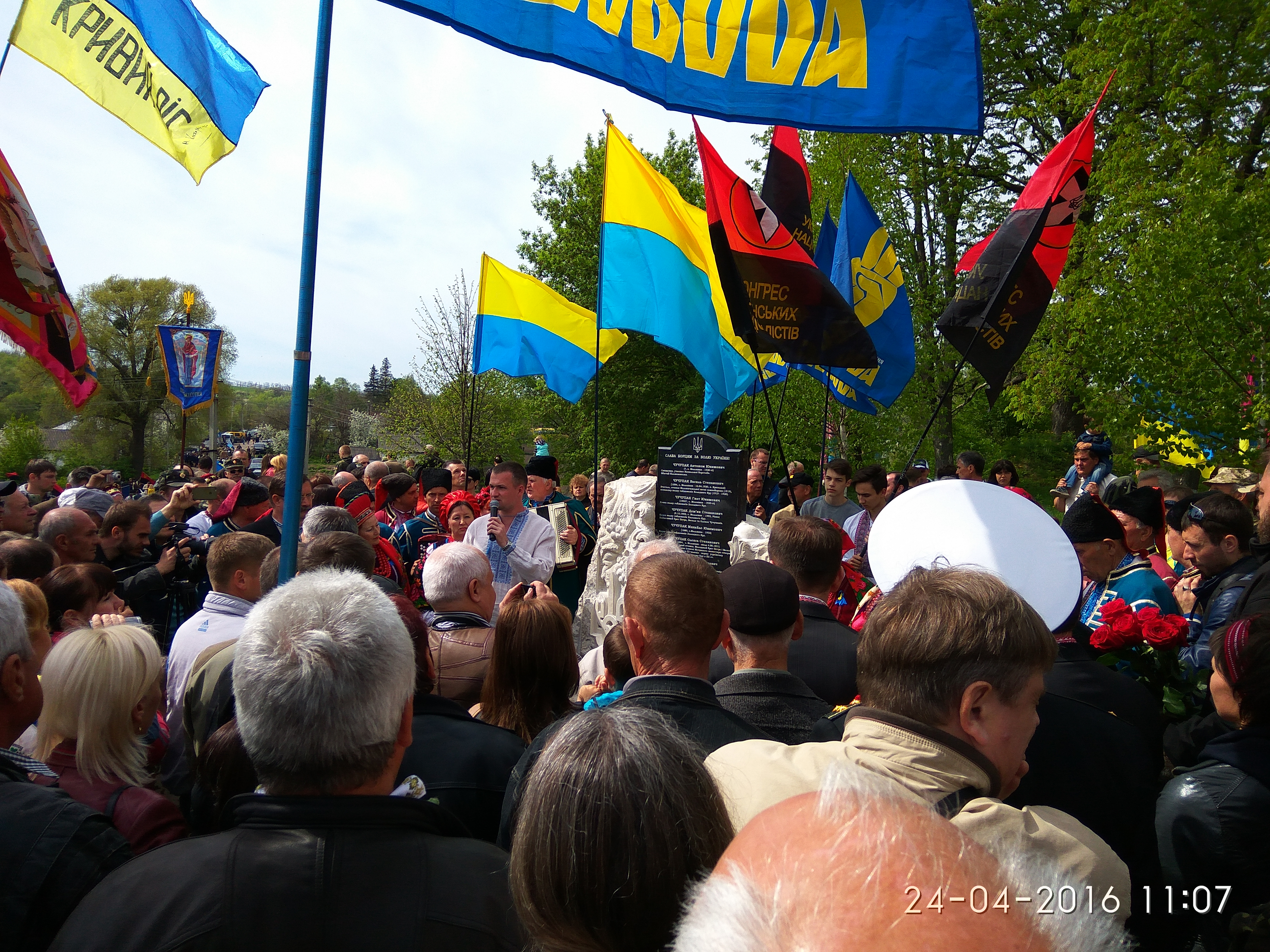 Юрій Левченко промовляє під час відкриття пам'ятника Борцям за волю України Чучупакам